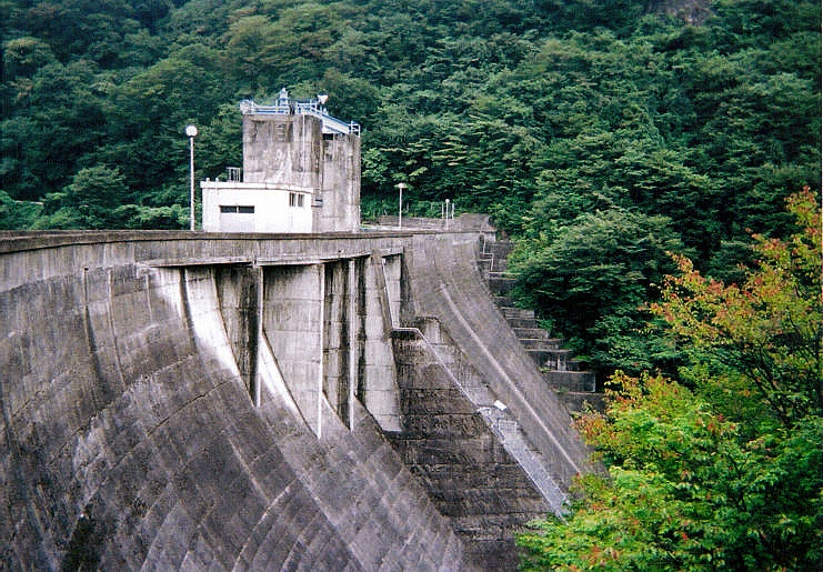 Dam